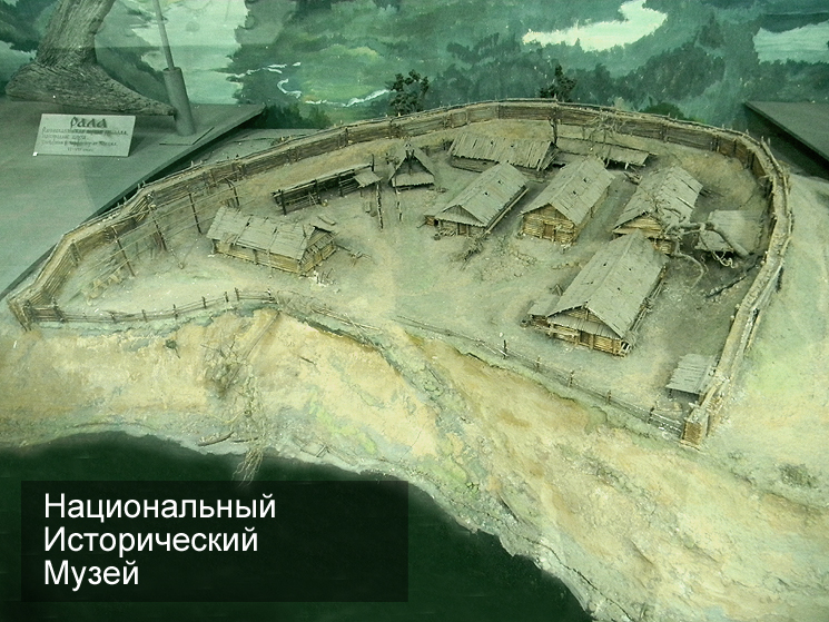 Макет паселішча. Экспазіцыя «Старажытная Беларусь»